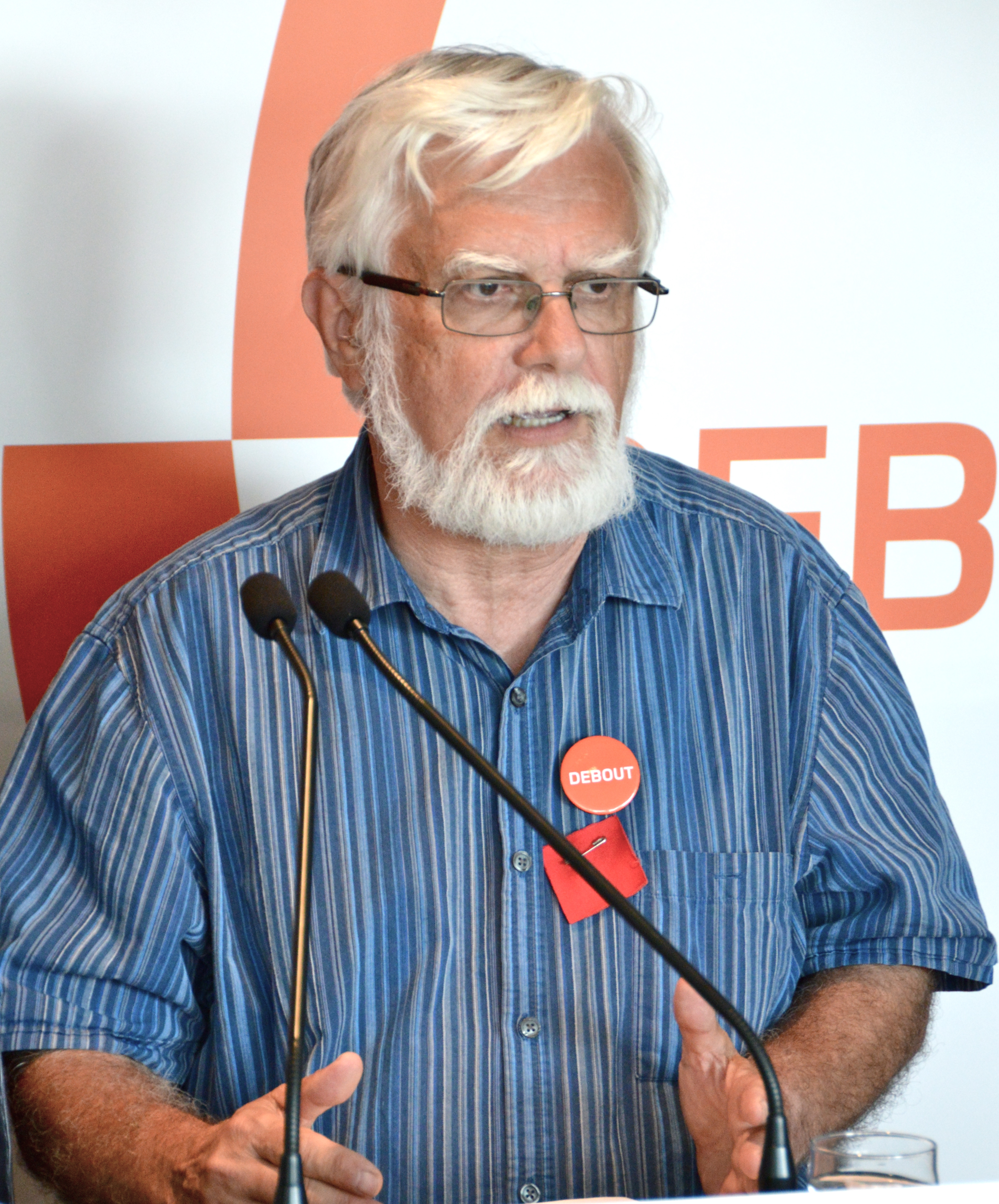 Serge Roy, candidat de Québec solidaire dans la circonscription de Taschereau, à Québec, lors de l'élection générale québécoise de 2012